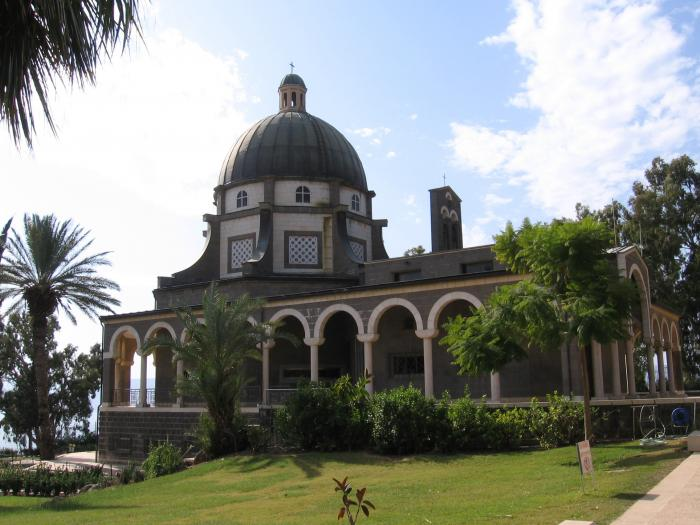 Beatitudine